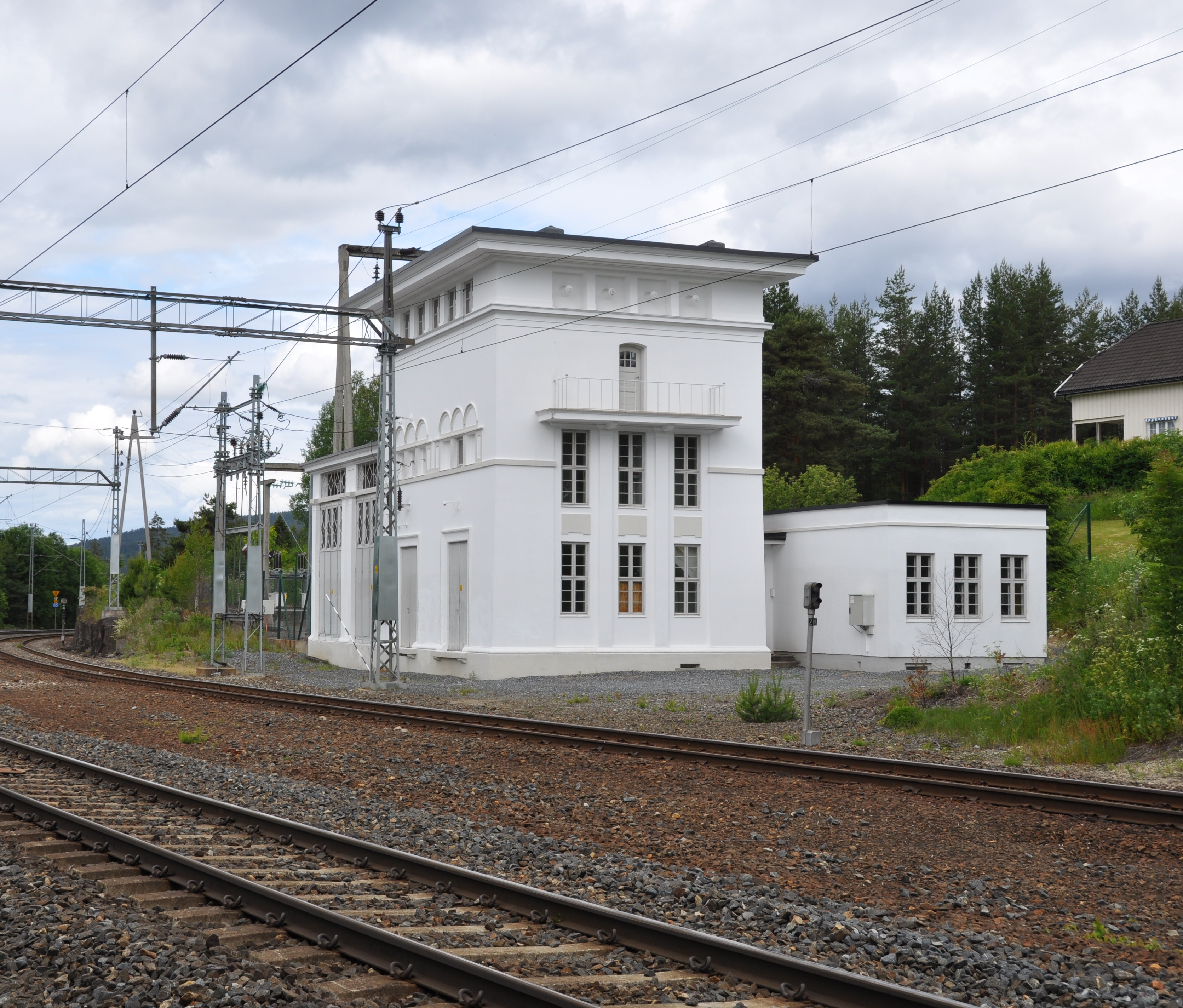 Skollenborg transformatorstasjon ble satt i drift i 1929, og var en viktig brikke i den tidlige elektrifiseringen av jernbanen i Norge. Bygningen har i tillegg store arkitektoniske verdier, og er svært godt vedlikeholdt. I 1997 ble den fredet av Riksantikvaren. Dato: 19.06.2009